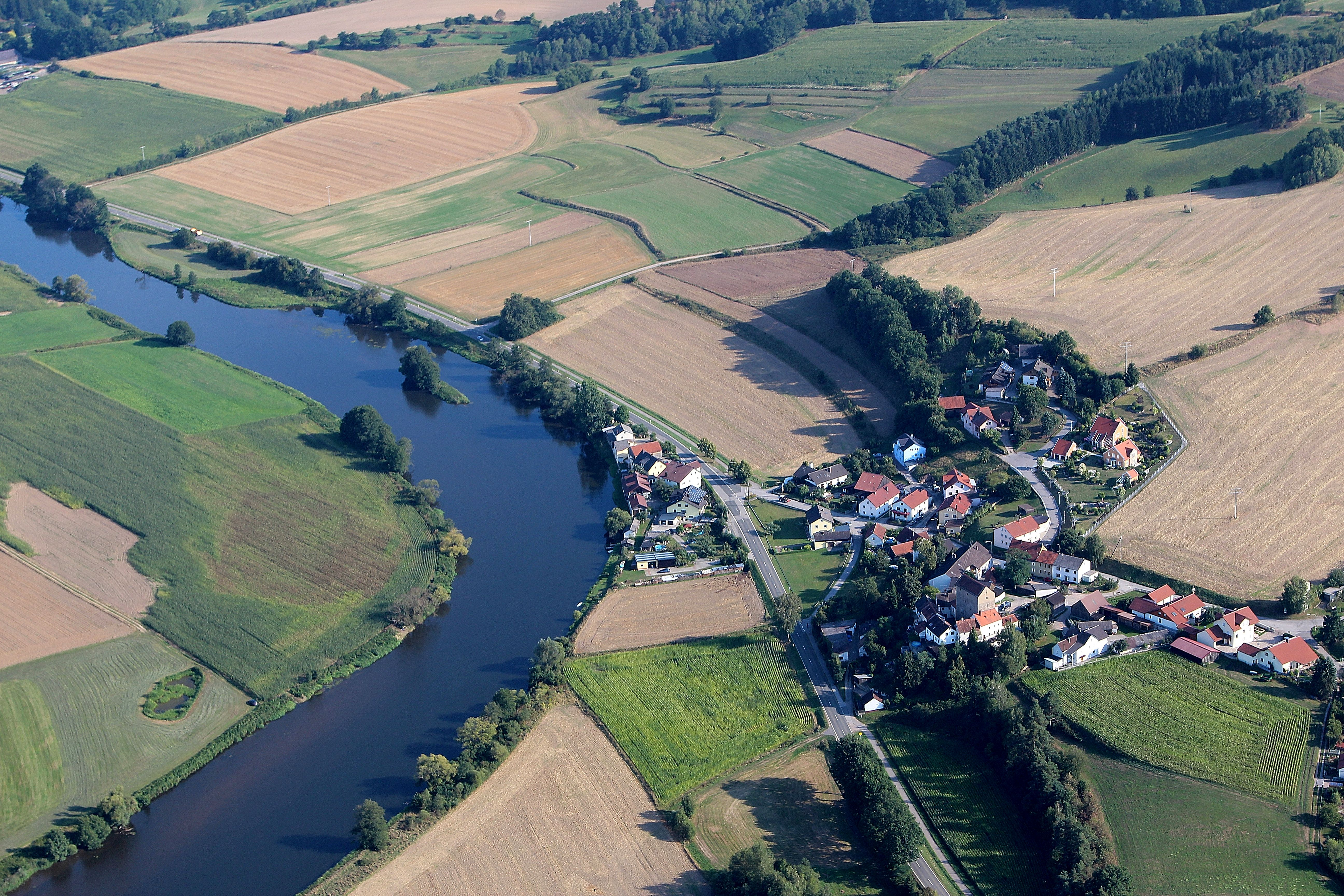 Hof am Regen bei Stefling ist ein Ortsteil von Nittenau, Landkreis Schwandorf, Oberpfalz, Bayern